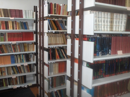 Српски (ћирилица): Поглед на Позајмно одјељење ЈУ Народне библиотеке Градишка